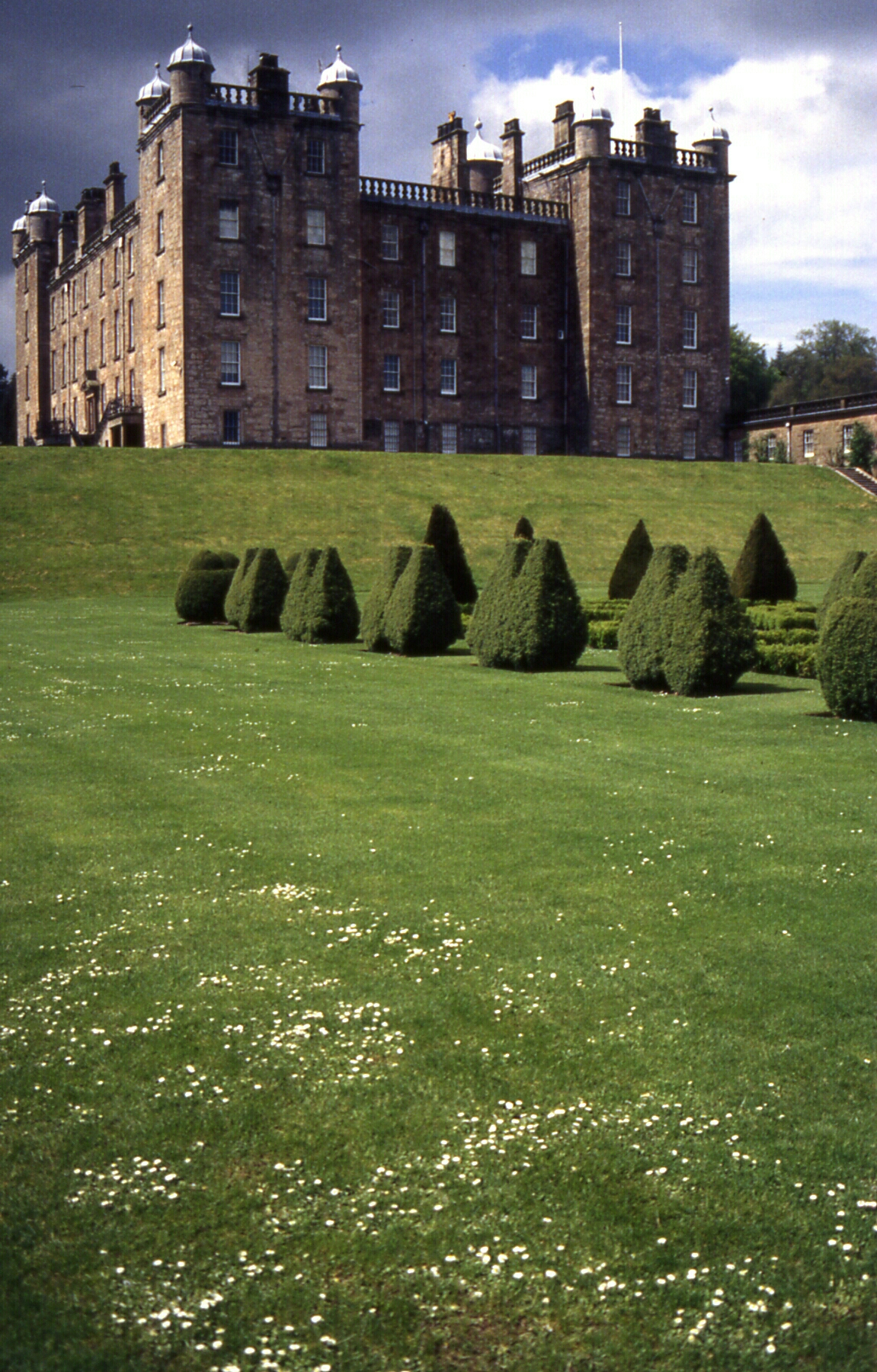 Drumlaning Castle